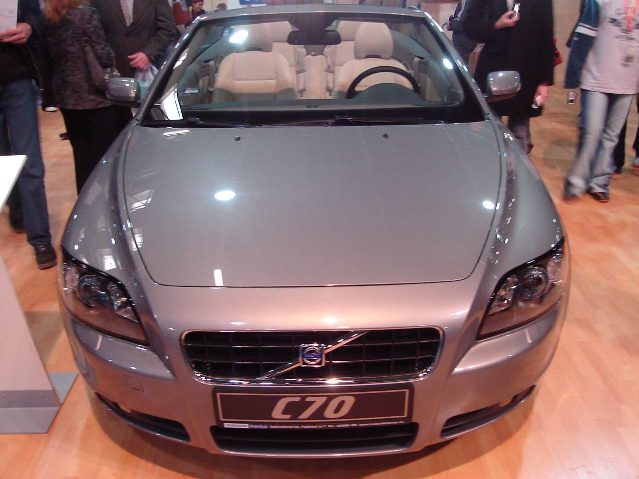 Volvo C70 egy budapesti luxusautóbemutatón